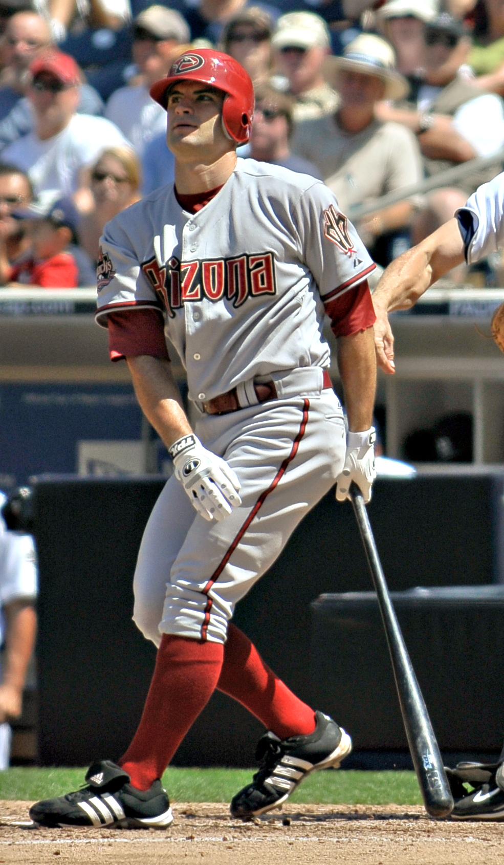 Chris Burke